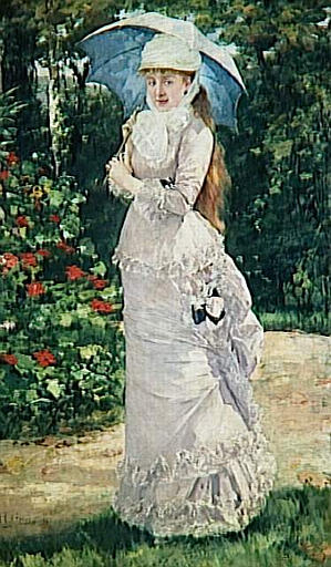 Valtesse de La Bigne est une demi-mondaine née en 1848-1910 par by Henri Gervex, Paris, Musée d'Orsay